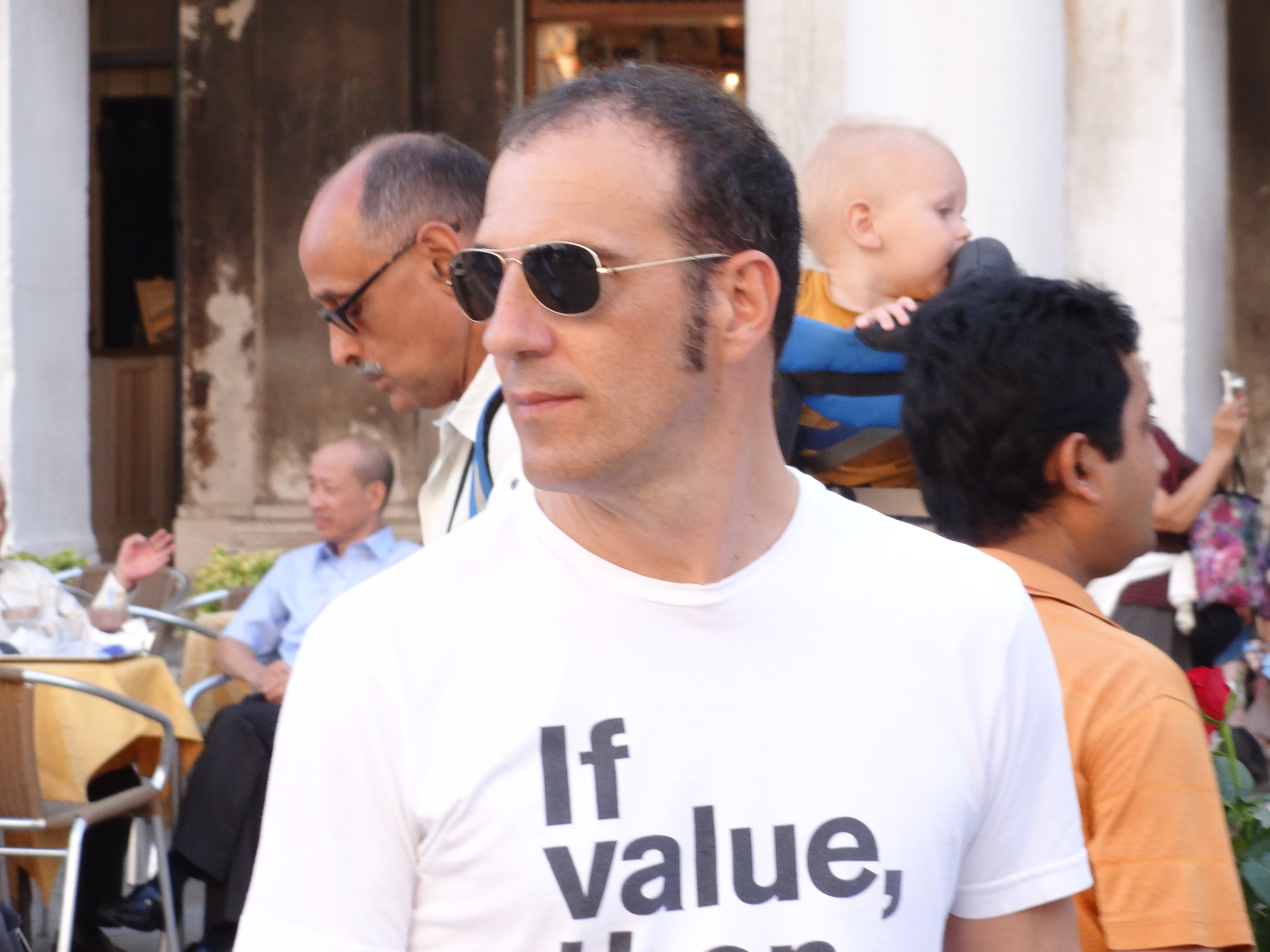 Cadão Volpato na Itália